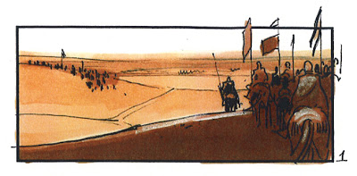 Én tegning fra Simon Bangs storyboard til filmen Arn, 2007